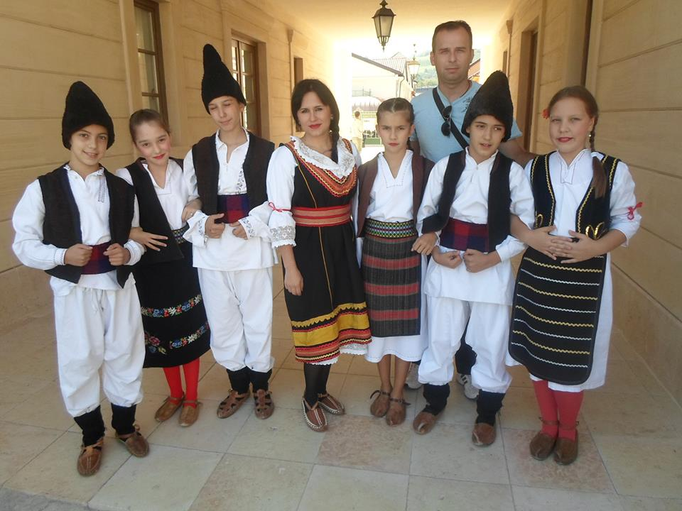 Српски (ћирилица): Вишеград